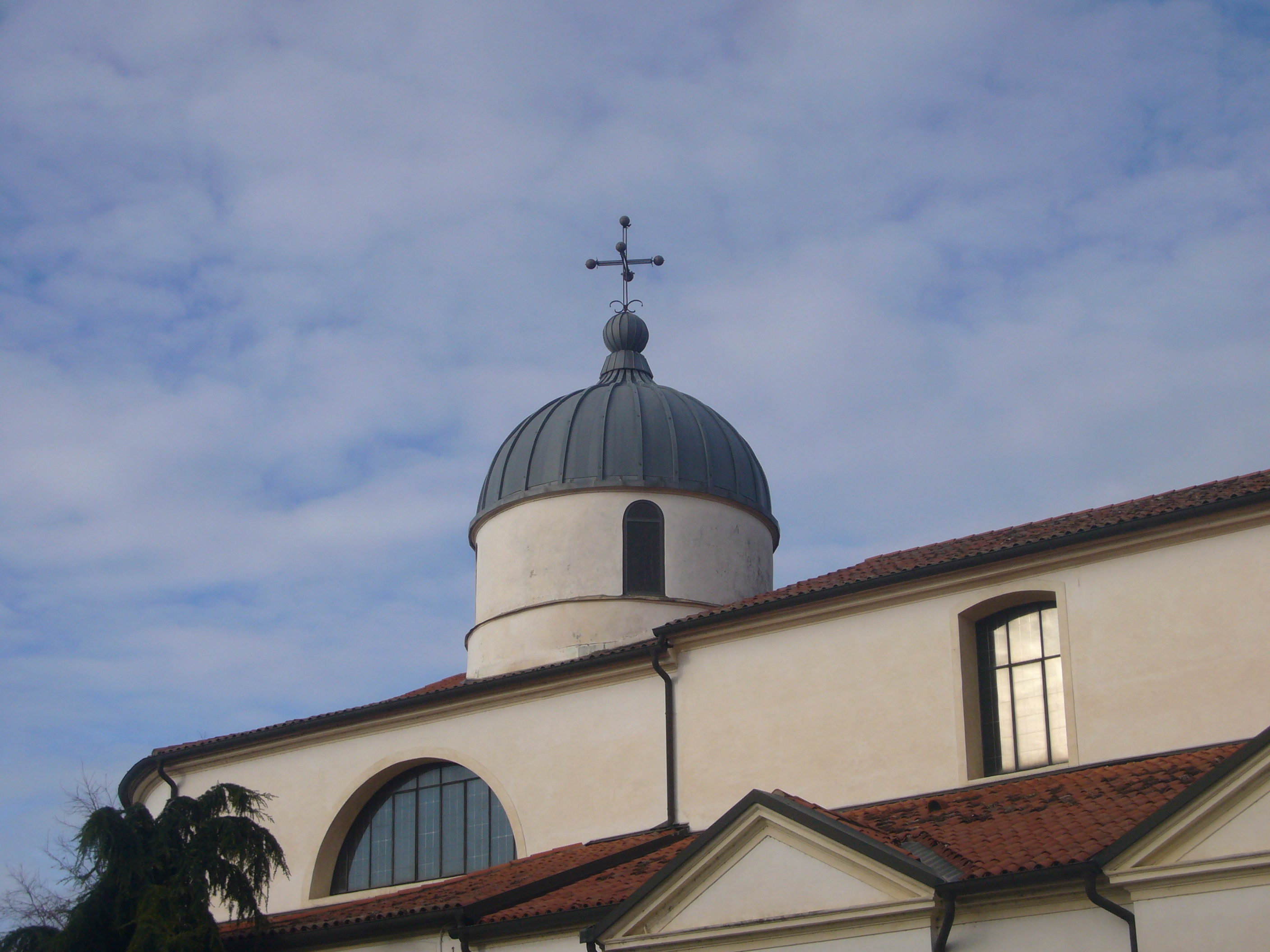 La cupoletta della chiesa di San Vitale a Ceggia